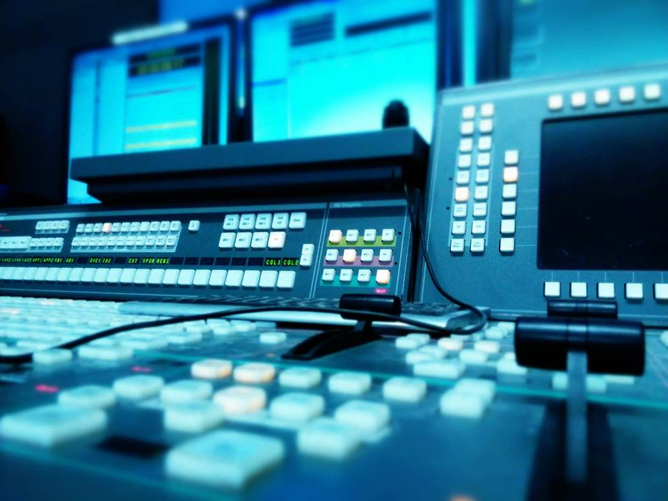 Bildmischer